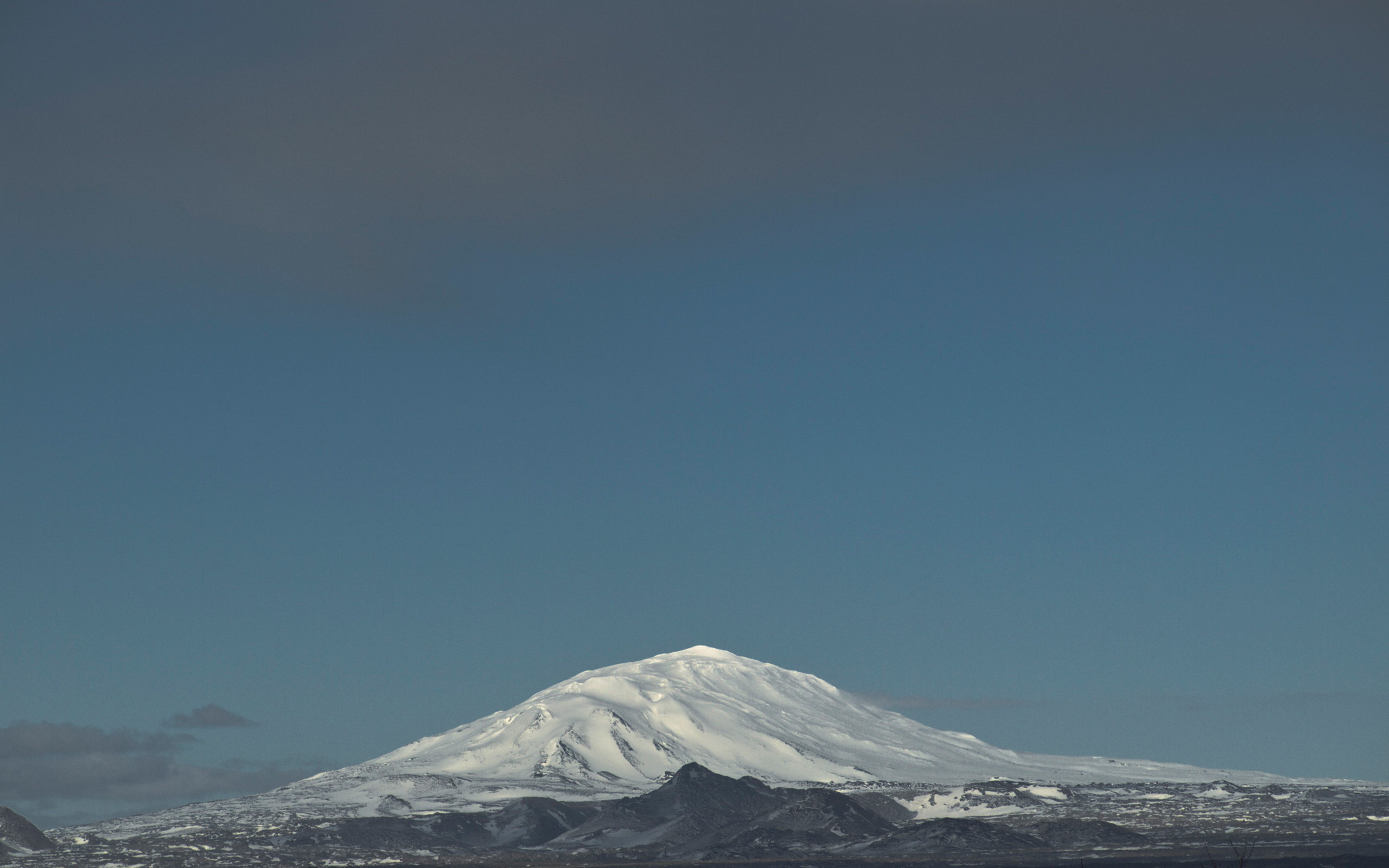 Snowy Hekla